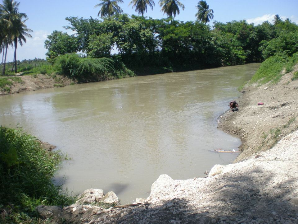 Río Yaque del Sur en Cabral, Barahona.